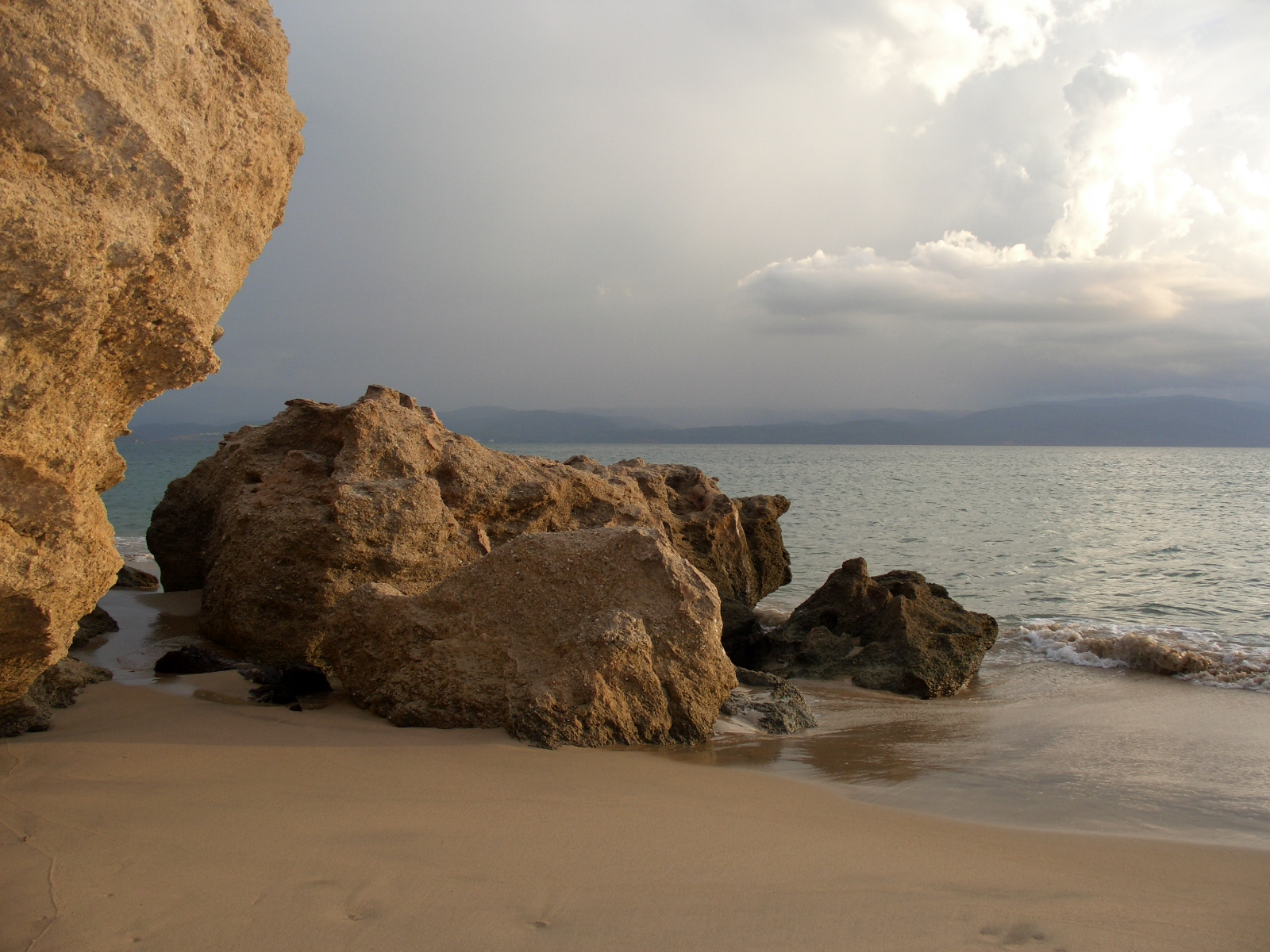 Al final de la tarde en una pequeña playa de la Península de Araya